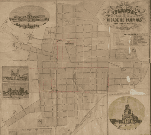 Mapa de Campinas de 1878.